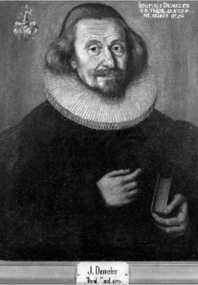 Joseph Demeler, Gemälde 1659